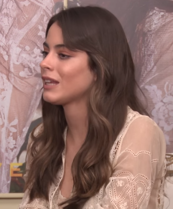 Tini Stoessel en entrevista con Todo Noticias